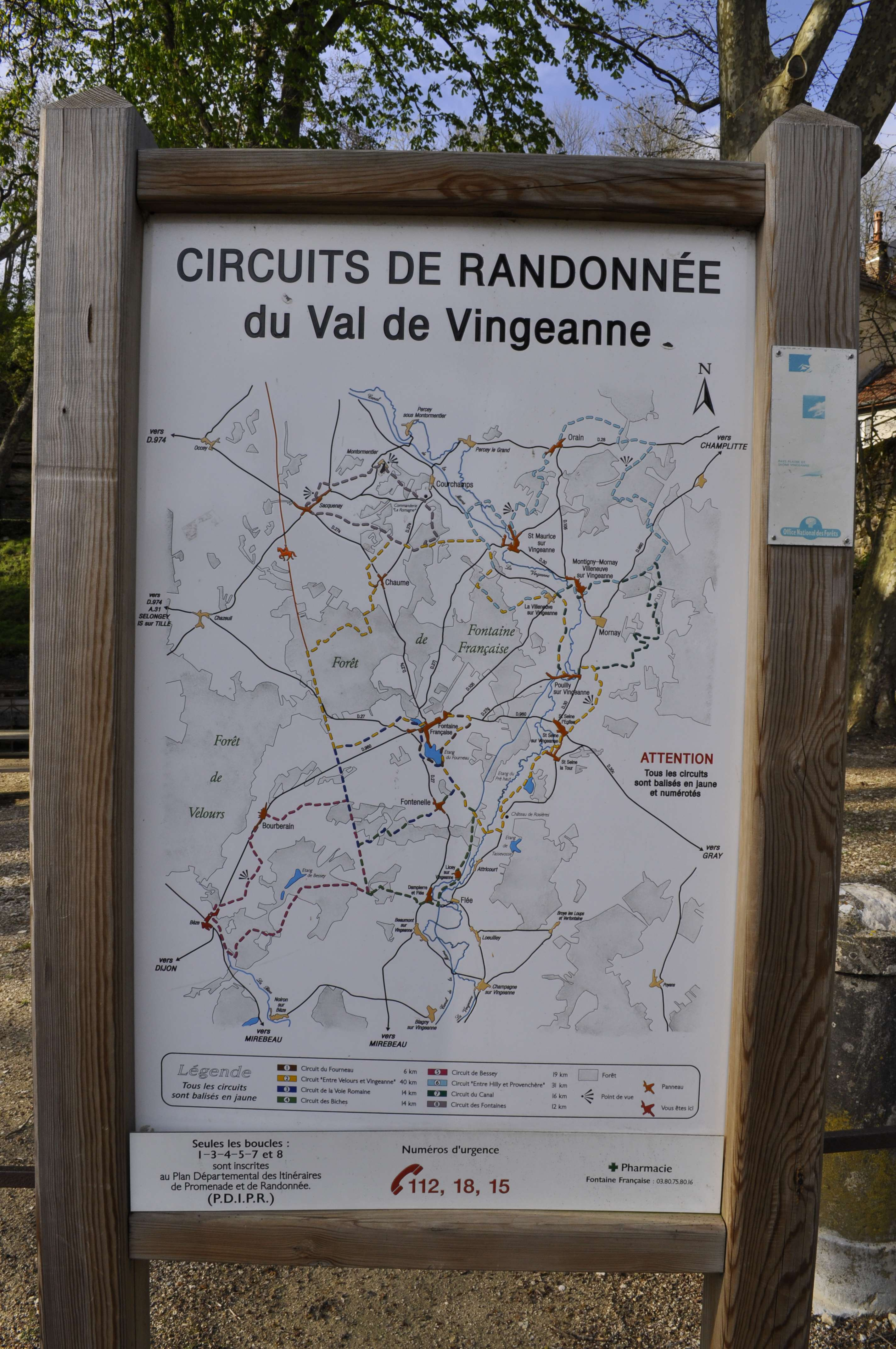 Carte des randonnées depuis Bèze située à la source de la Bèze.